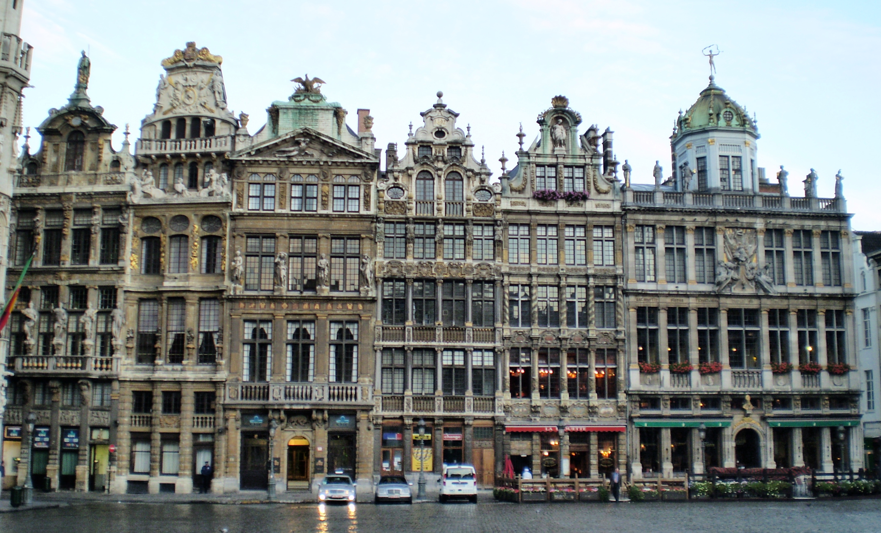 Maisons de la Grand-Place de Bruxelles, entre la rue de la Tête d'or et la rue au Beurre (ouest): Le Renard, Le Cornet, La Louve, Le Sac, La Brouette, Le Roi d'Espagne et Saint Jacques (unifiée).